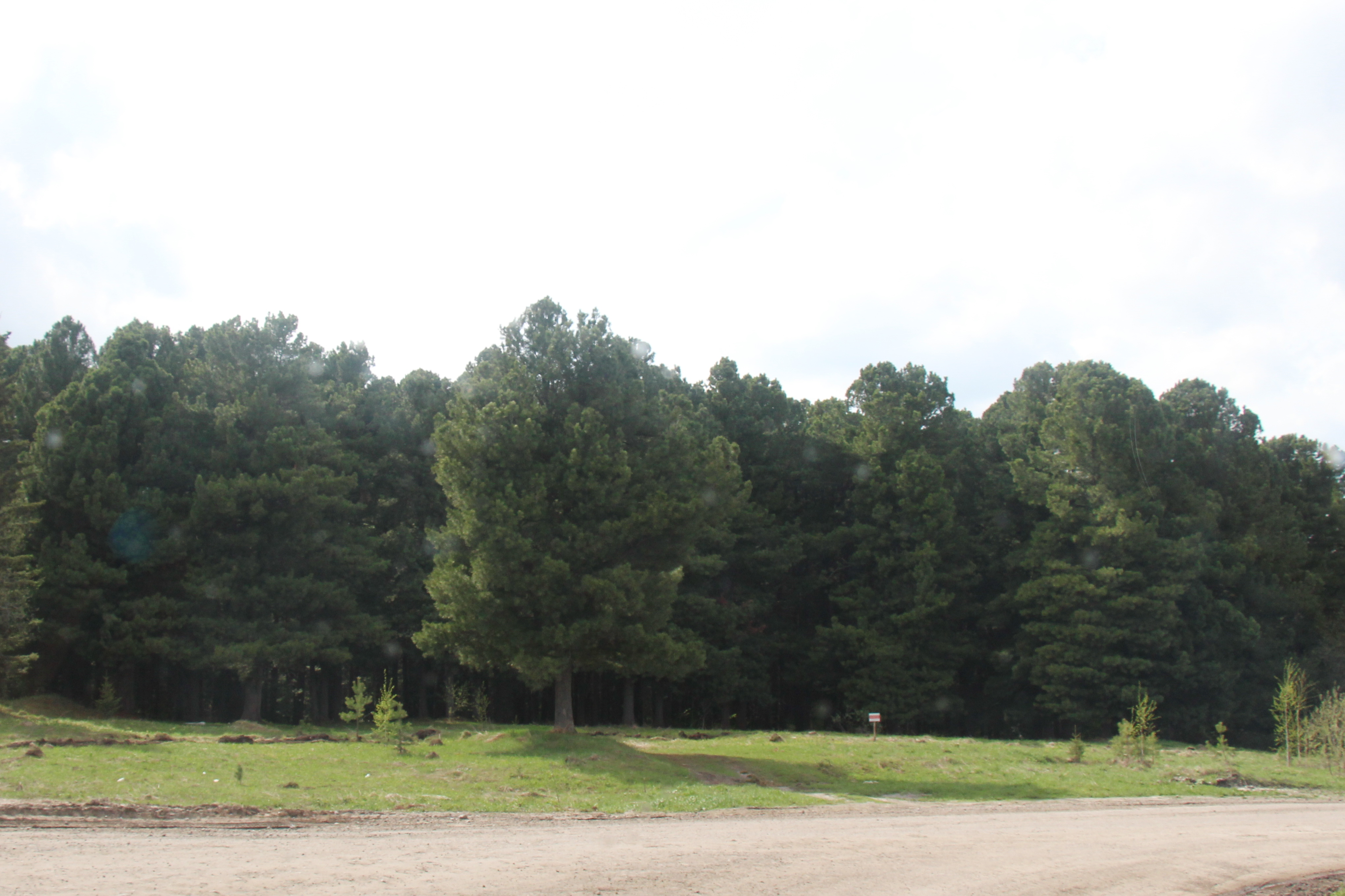 Белоусовский припоселковый кедровник: Белоусовский припоселковый кедровник расположен на территории государственного лесного фонда и включает квартал 50, за исключением 13-го выдела, и квартал 51, за исключением 7-го, 8-го, 14-го, 15-го и 17-го выделов, Богашевского участкового лесничества Томского лесничества филиала ОГУ "Томское управление лесами", Томский район, Томская область This image is related to the protected area of Russia number 7010235